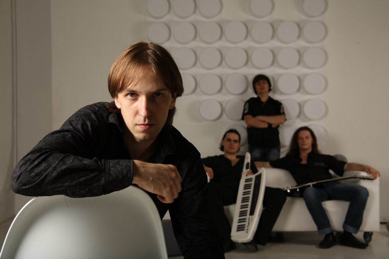 Фото с официальной страницы группы «В Контакте». Там указано разрешение на использование этой фотографии с этой лицензией + с разрешения самой группы